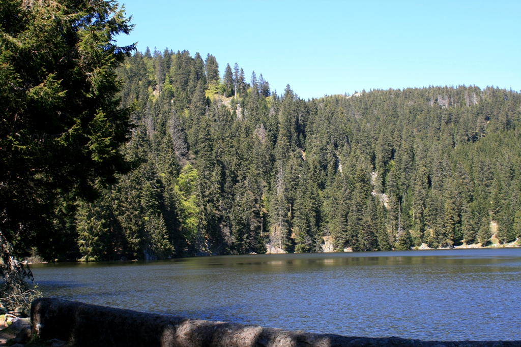 Lac vert